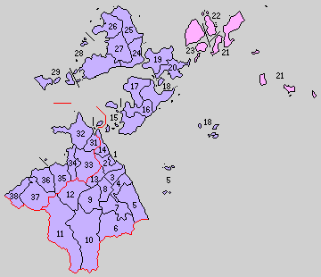 後の愛媛県越智郡域の町村制時点の町村。